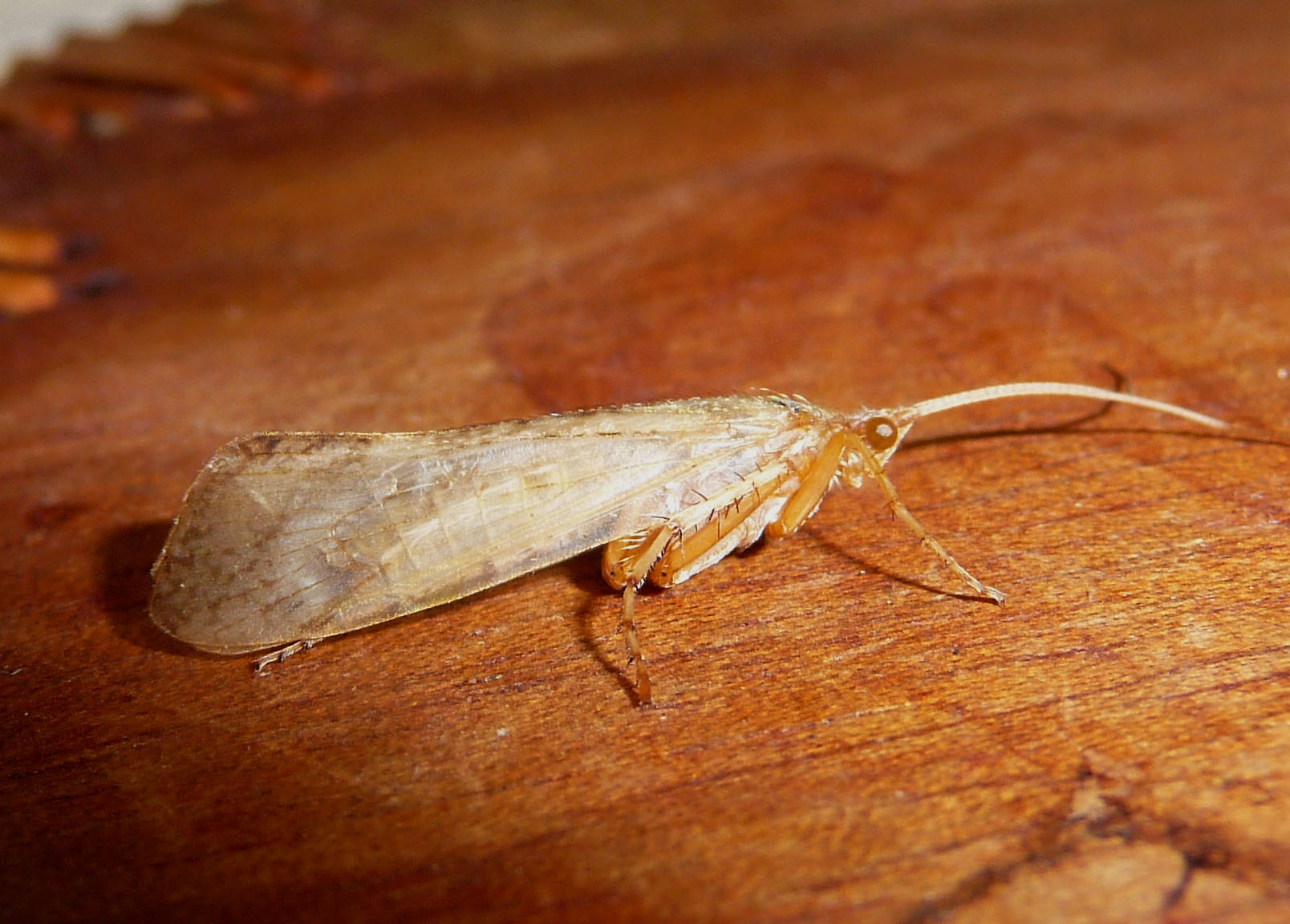 Caddis Fly. (Grammotaulius nigropunctatus?)